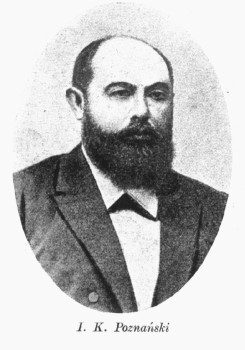 Izrael Poznański, łódzki fabrykant